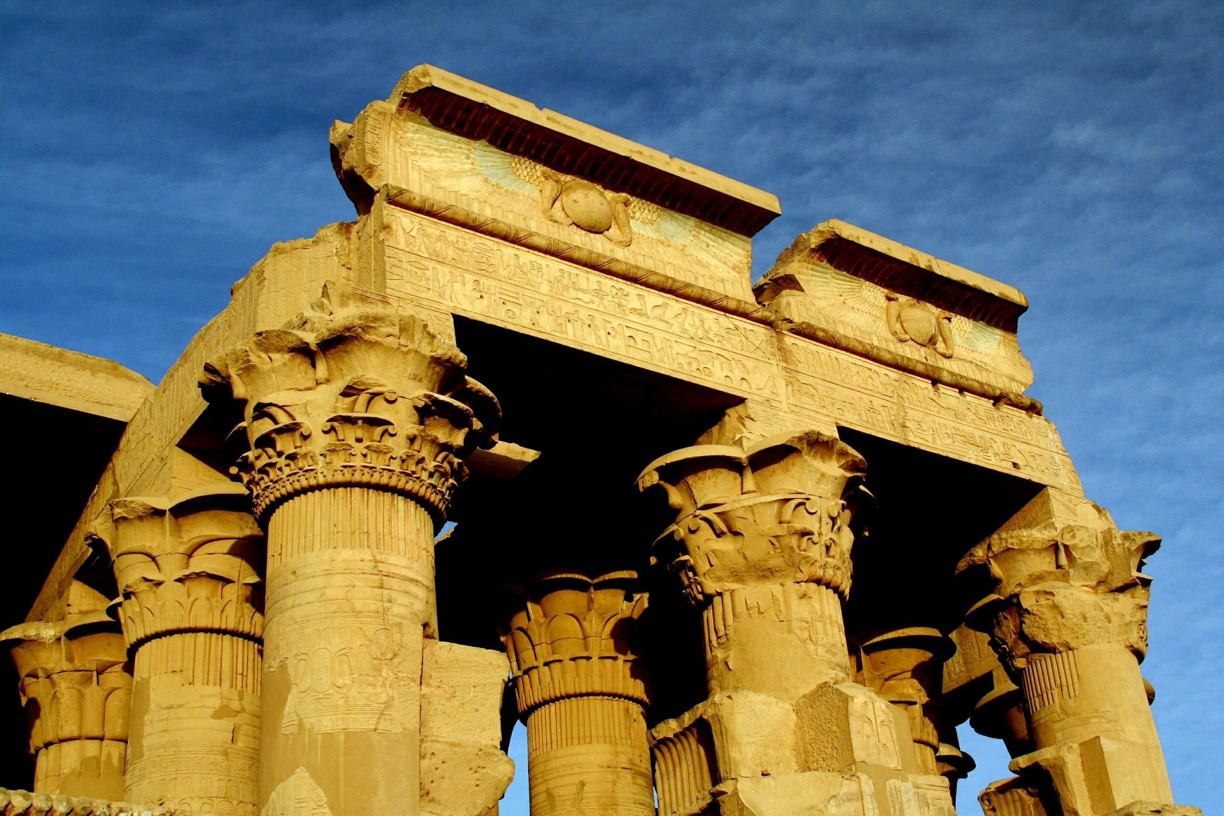 Kom Ombo - Temple of Sobek & Haroeris